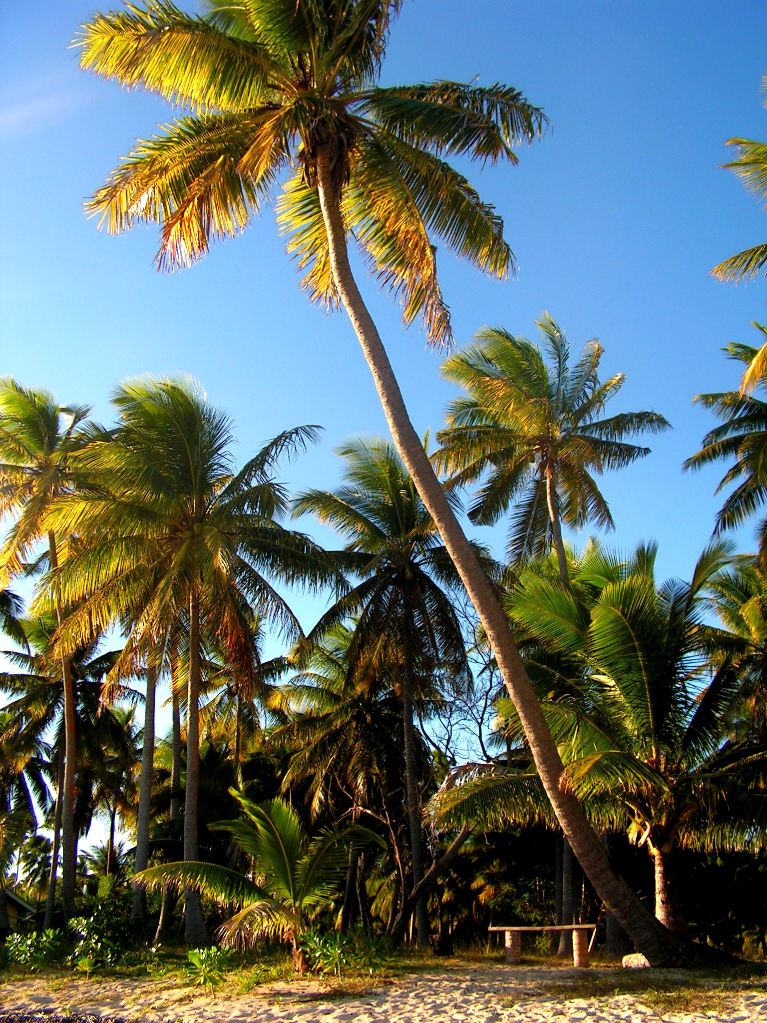 Sunset Bench (Fiji)